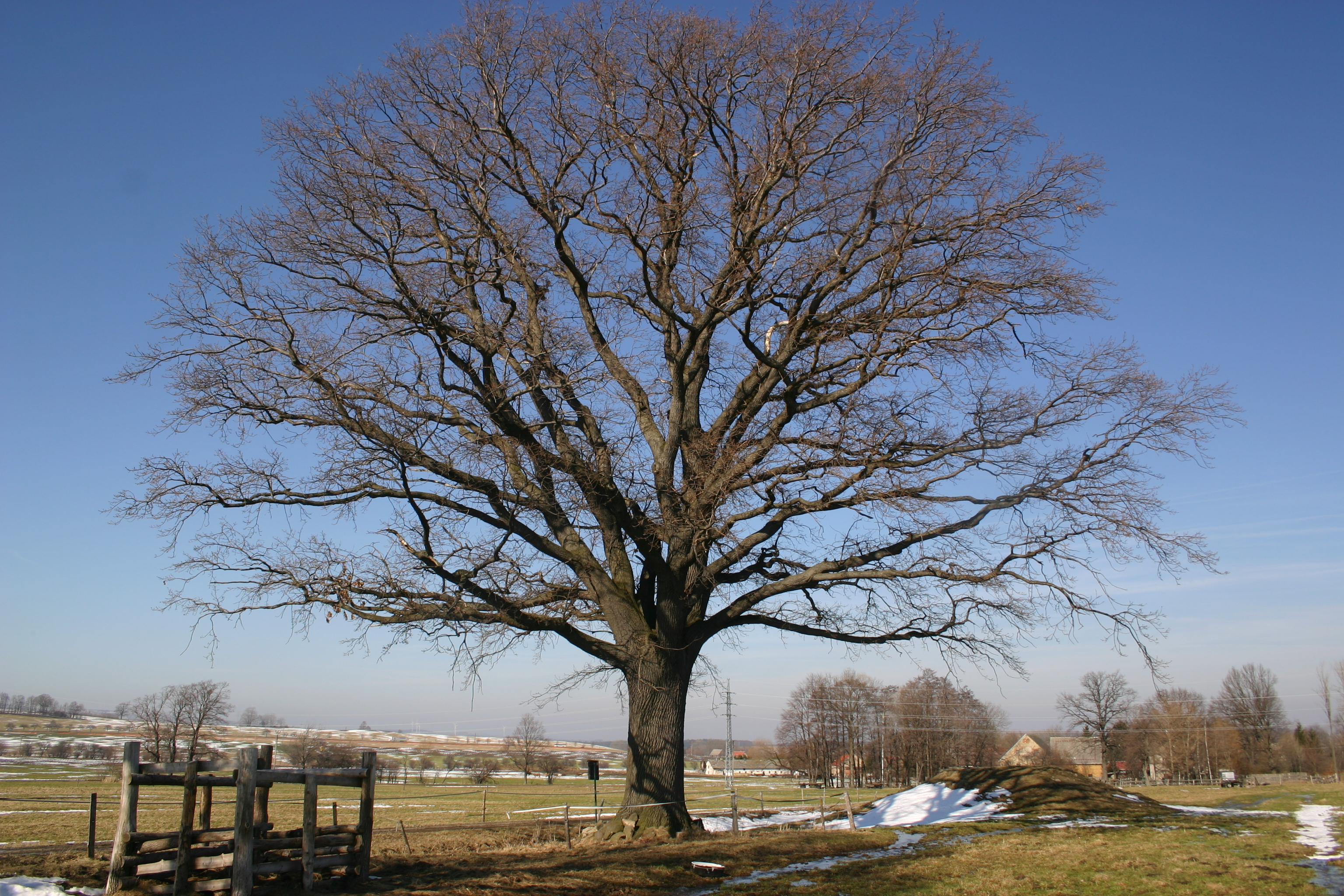 Dub u Větrova - Frýdlant